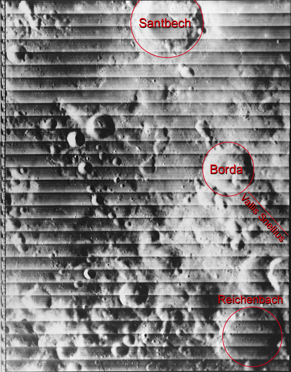 波达陨石坑及周边